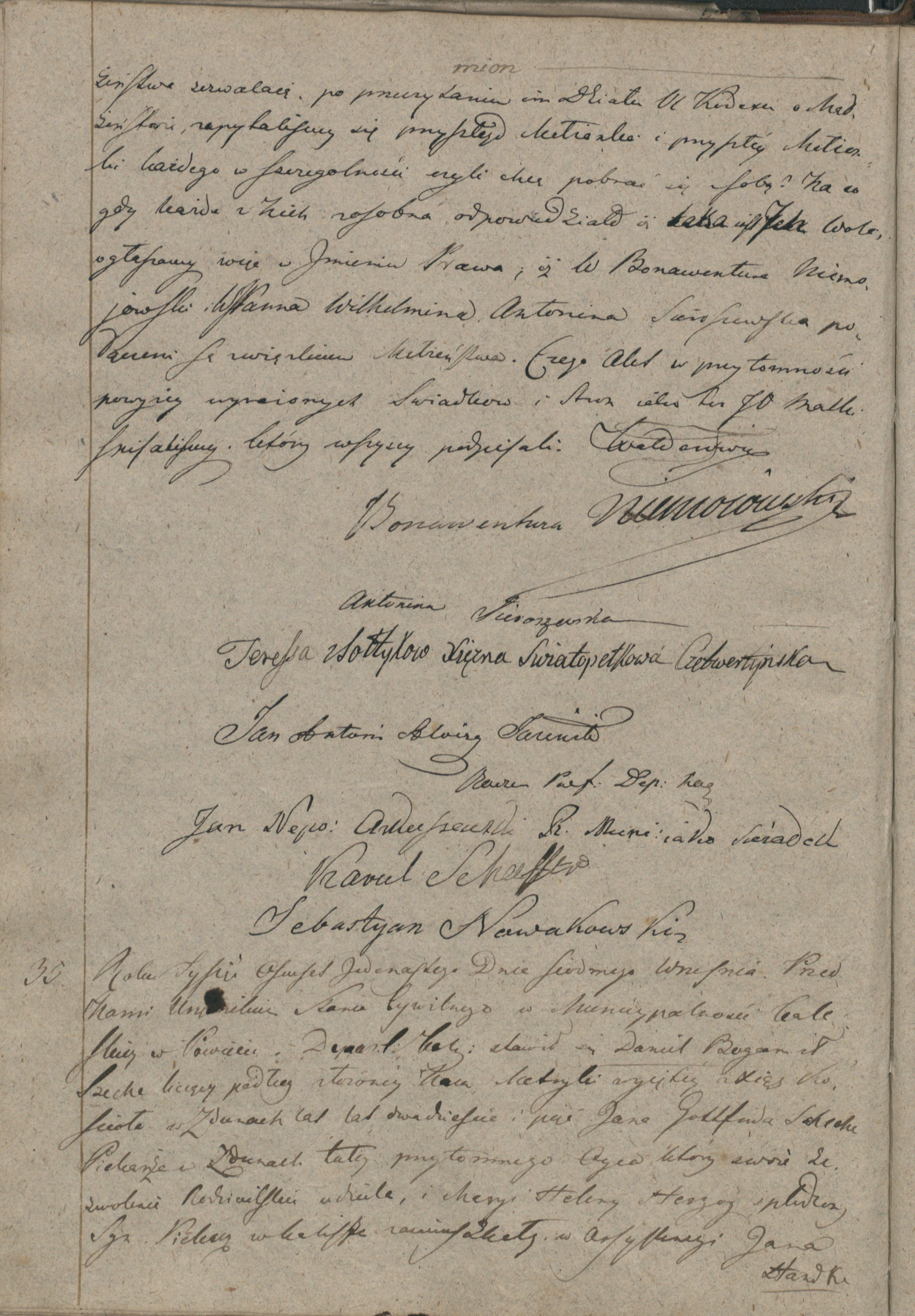 numer 34, strona 2